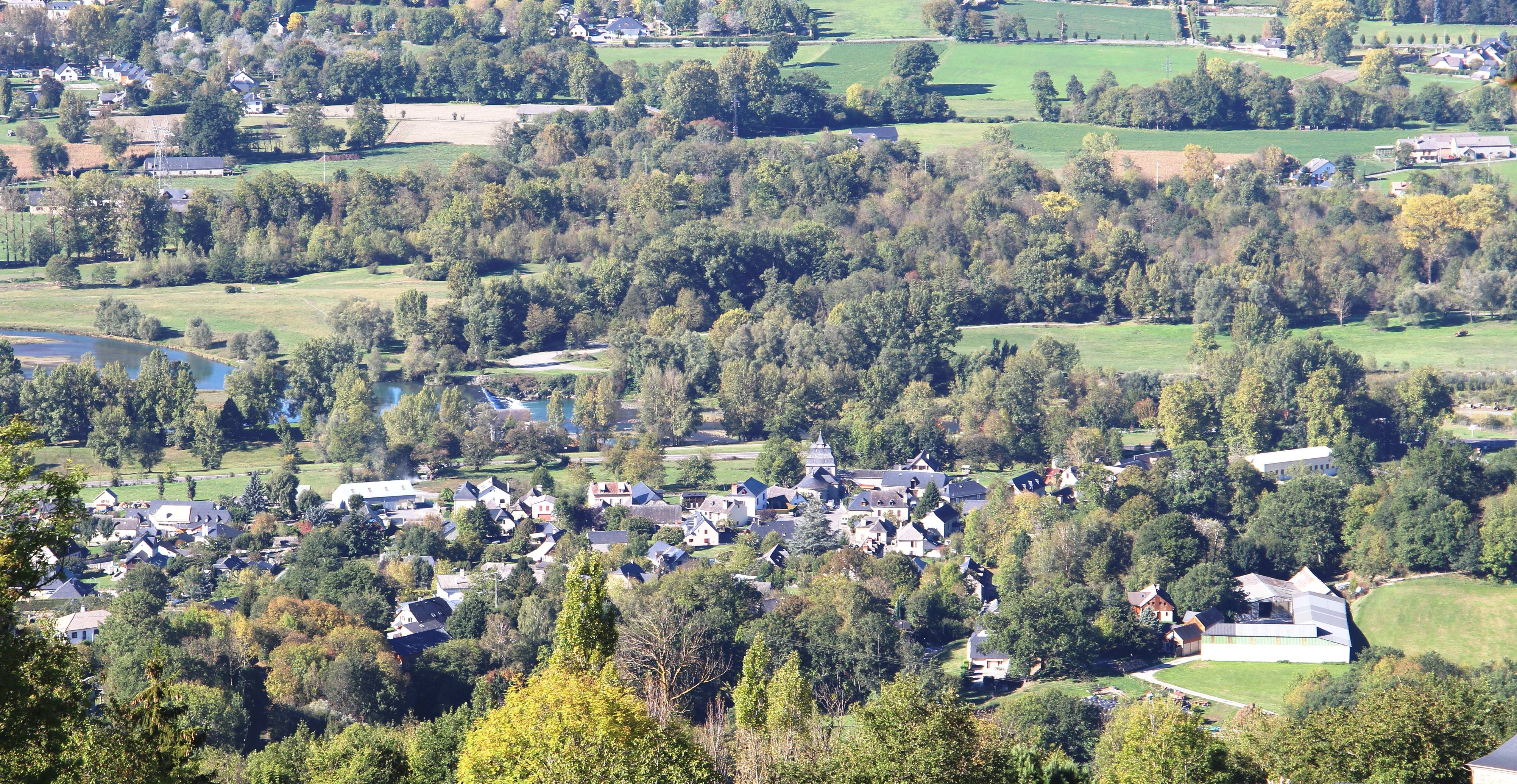 Préchac (Hautes-Pyrénées)